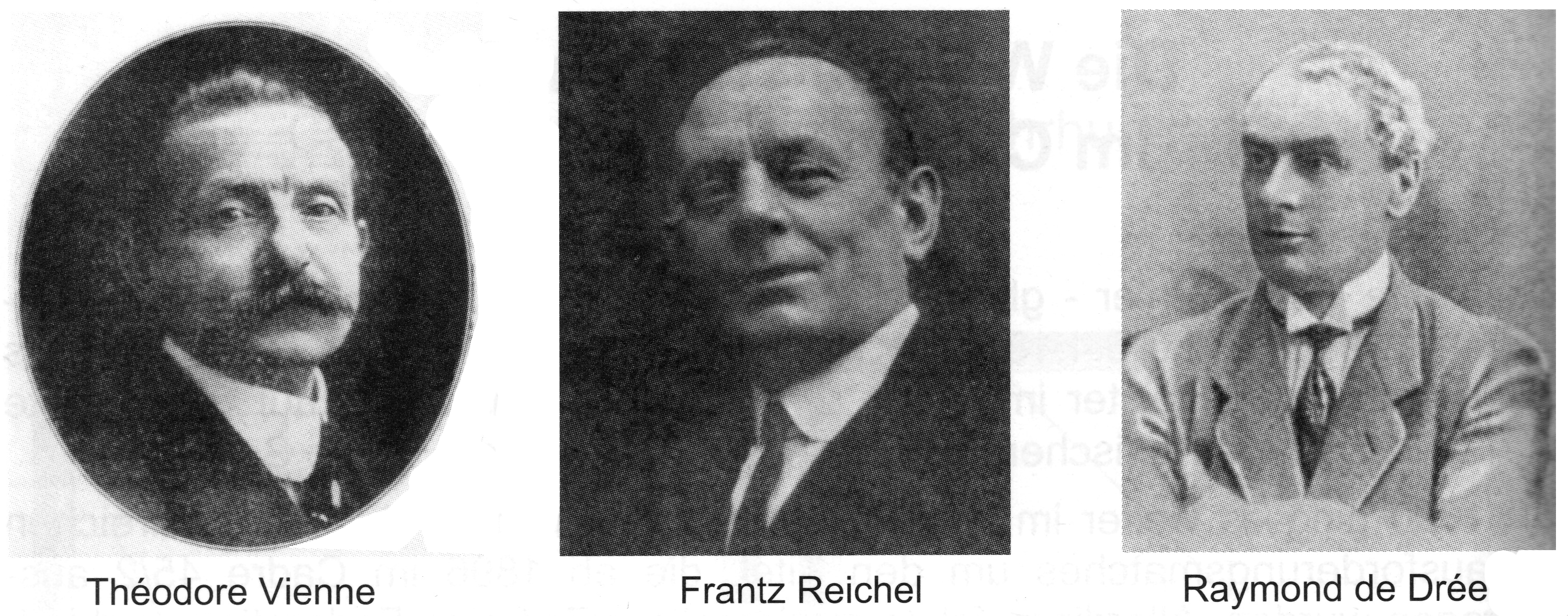 Die Vorstandsmitglieder Théodore Vienne, Frantz Reichel (Generalsekretär), Raymond de Drée (Präsident) der Fédération des Sociétés Françaises des Amateurs de Billard (FSFAB)